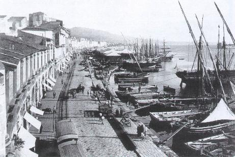 Capolinea del tram a vapore presso la pescheria di Messina (linee per Barcellona e per Giampilieri).